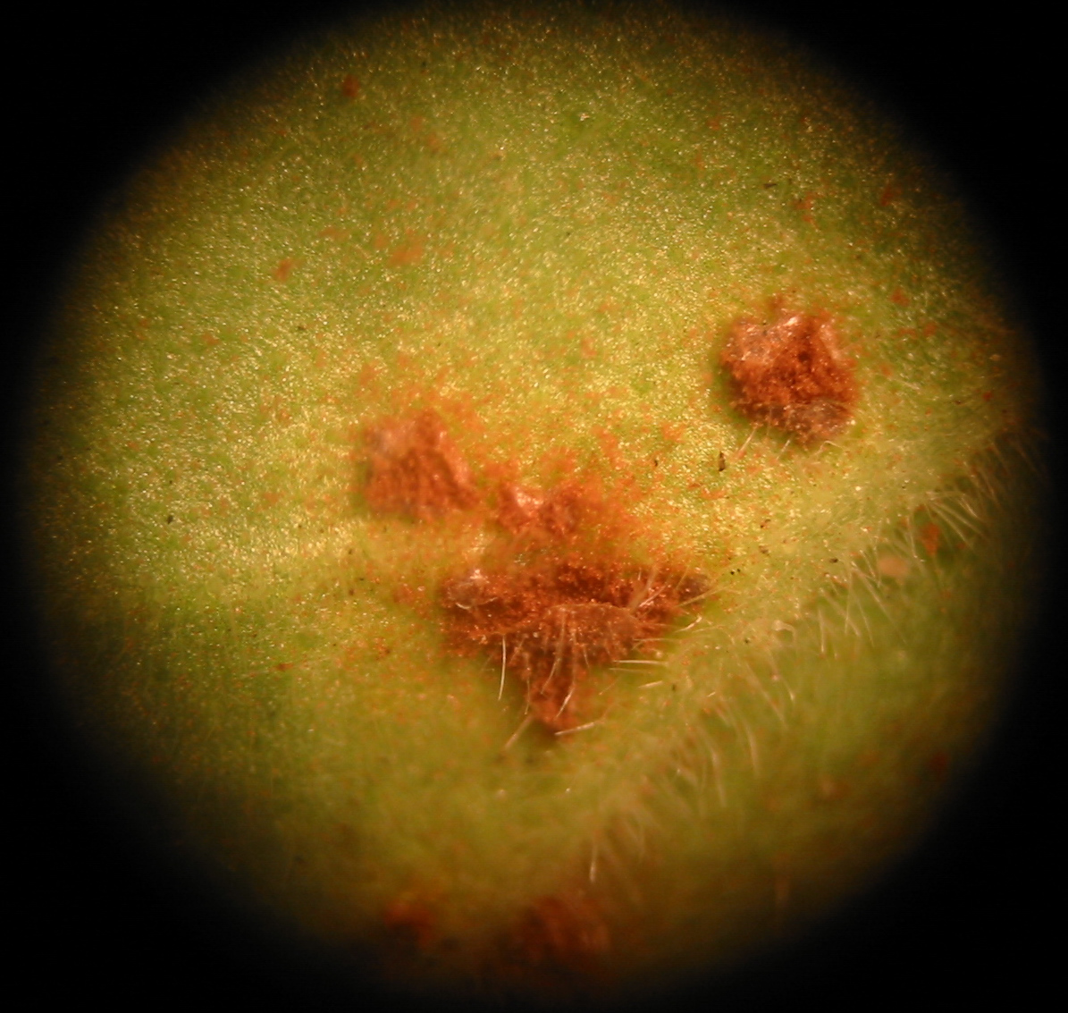 Rust